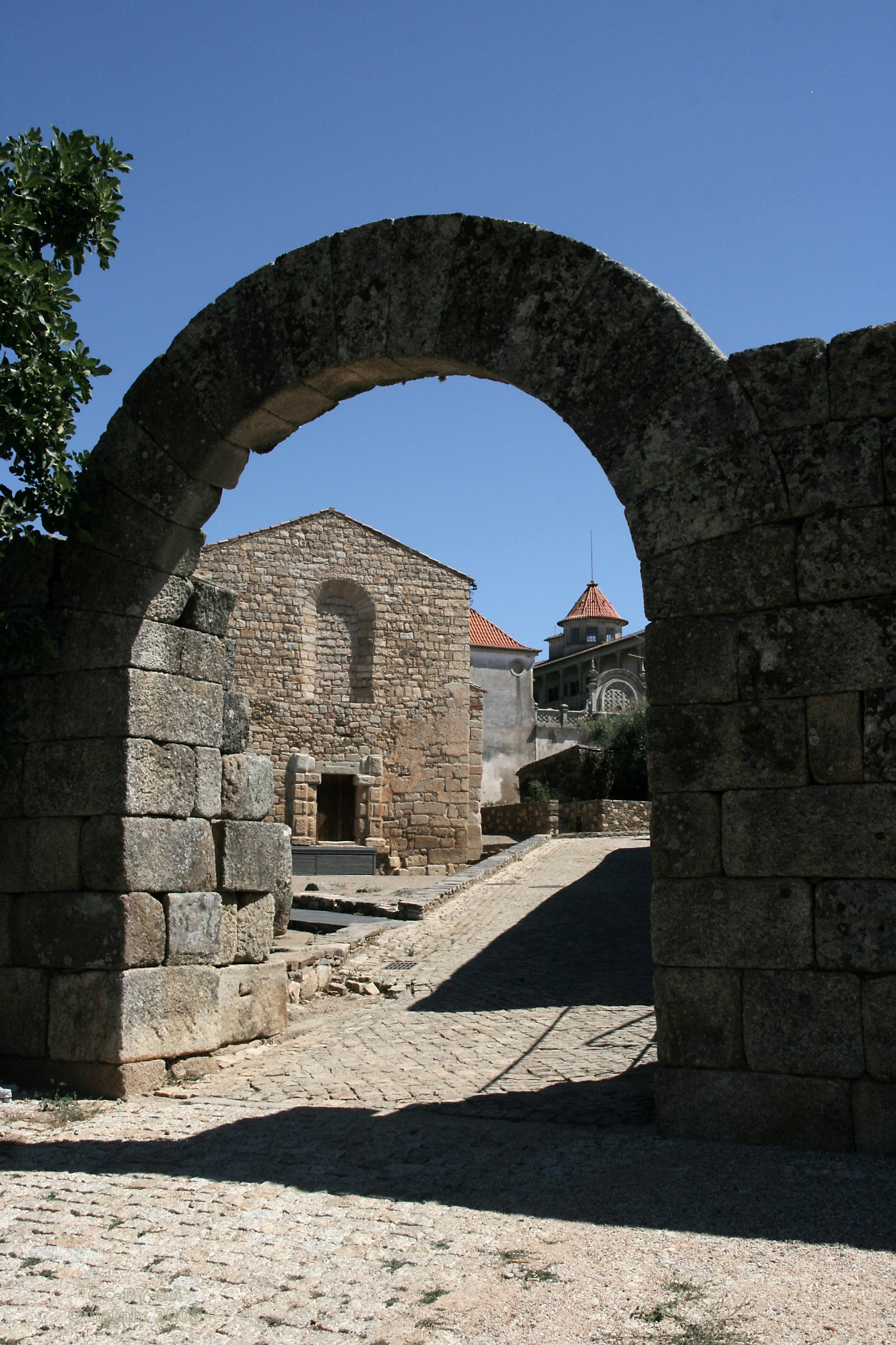 Idanha-a-Velha (Idanha-a-Nova): stadspoort met kerk ("kathedraal")